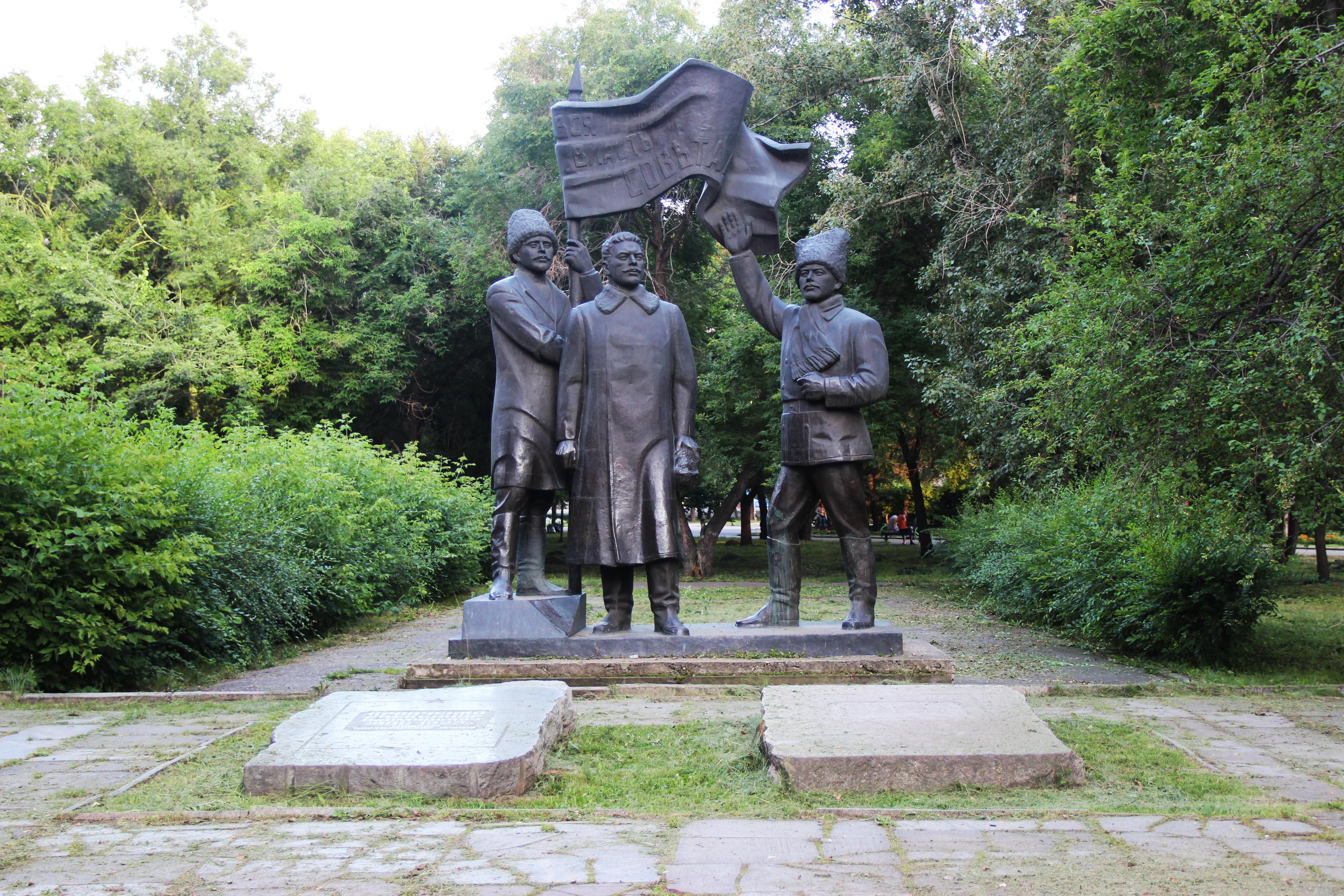 в 1993 г.— был установлен памятник руководителям партизанской армии — А. Д. Кравченко, П. Е. Щетинкину, С. К. Сургуладзе (скульптор Х. Б. Геворкян), рядом с захоронениями А. Д. Кравченко и С. К. Сургуладзе.